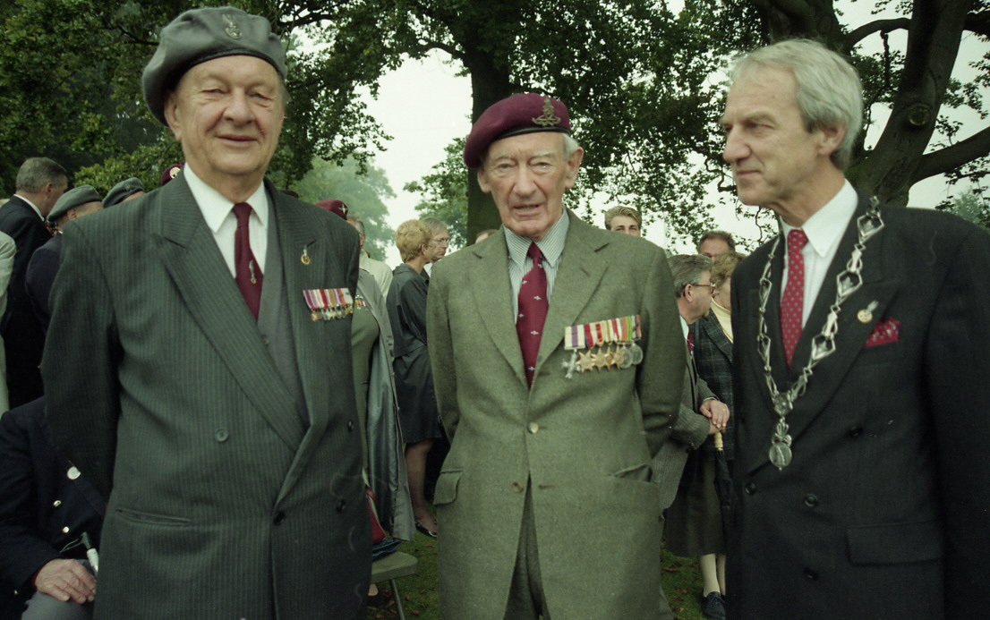 Herdenking met o.a. Tony Hibbert